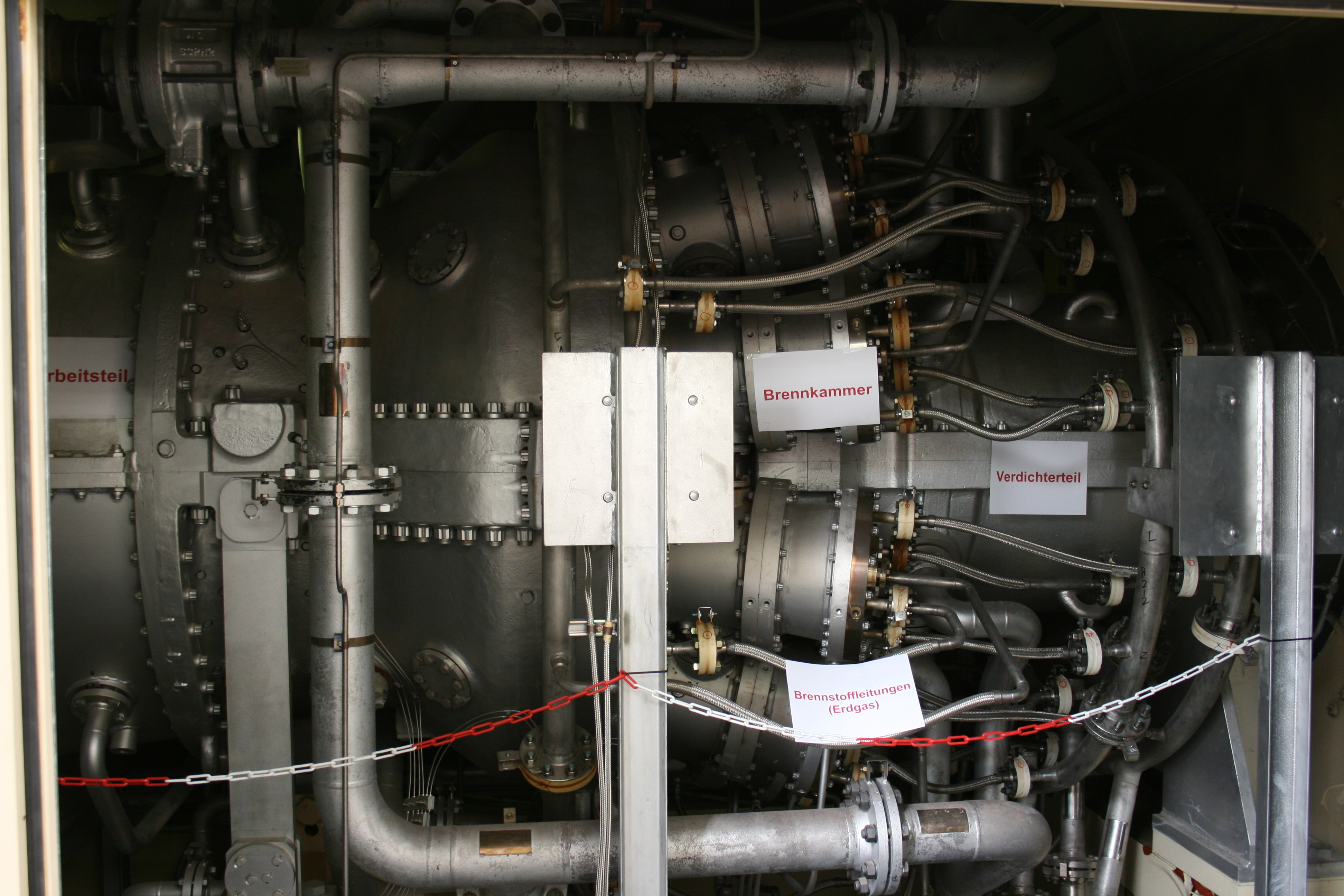 Heizkraftwerk in Wuppertal-Barmen